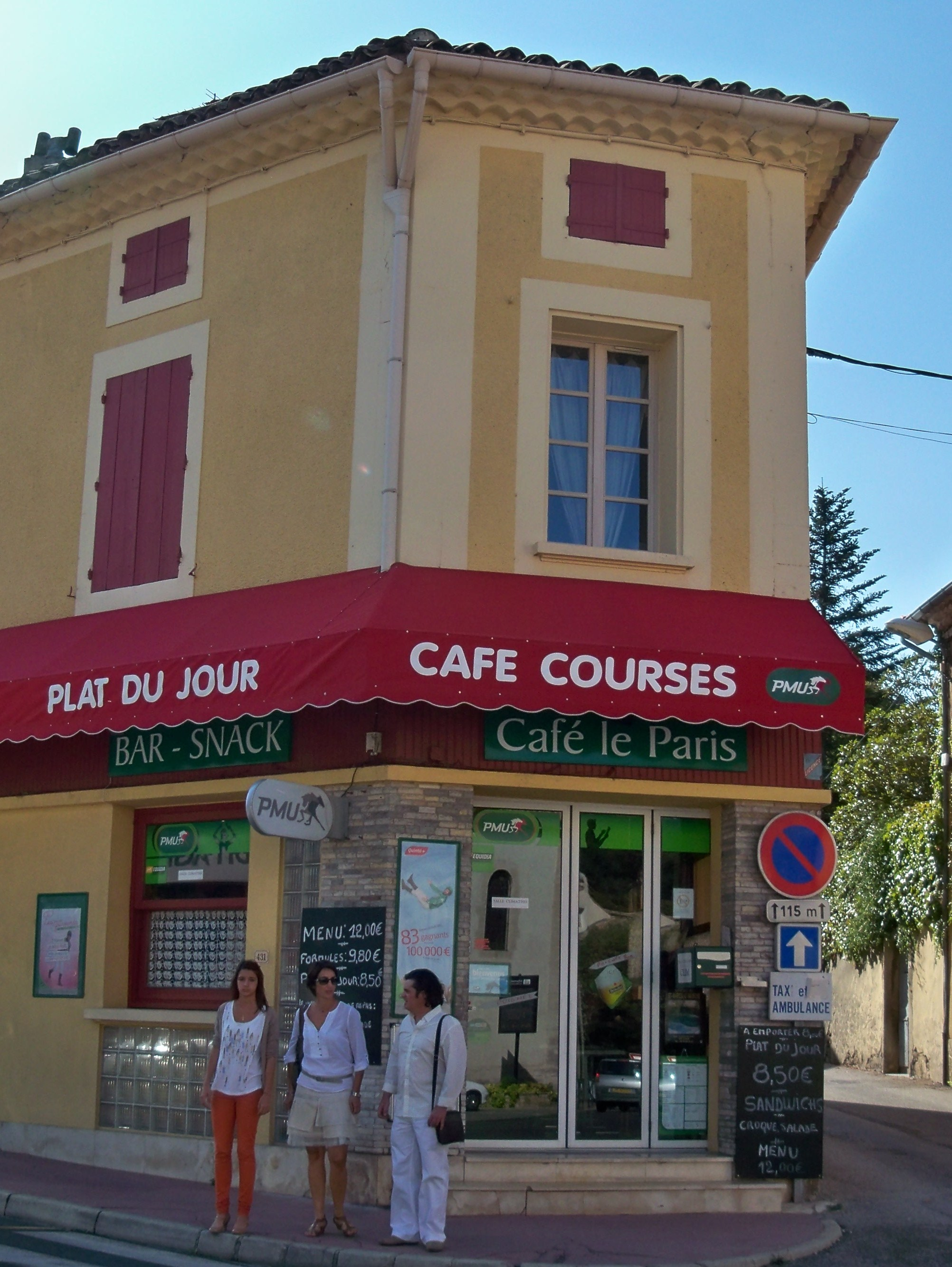 Café à Suze la Rousse